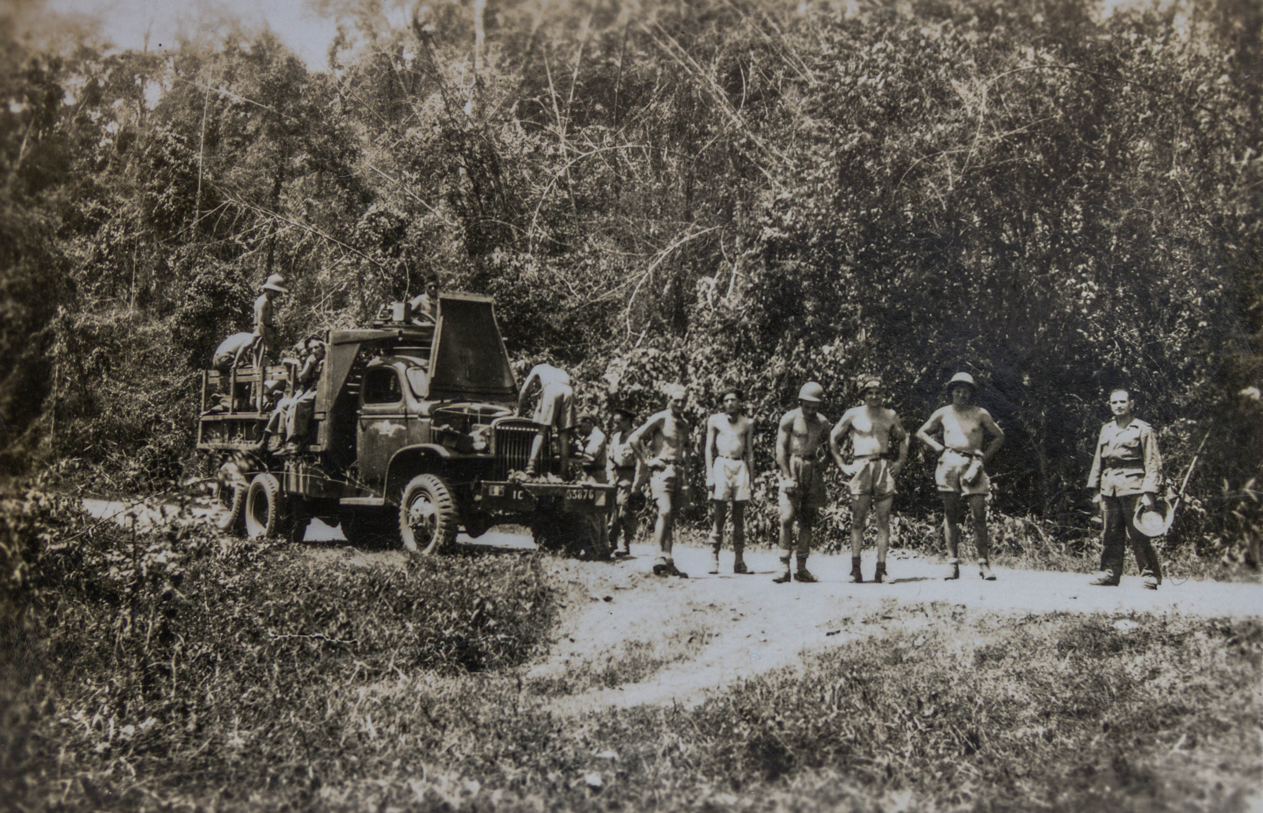 Inscription : "Route de Saignon Dalat." Photo prise pendant la guerre d'Indochine par André Maton, soldat français.